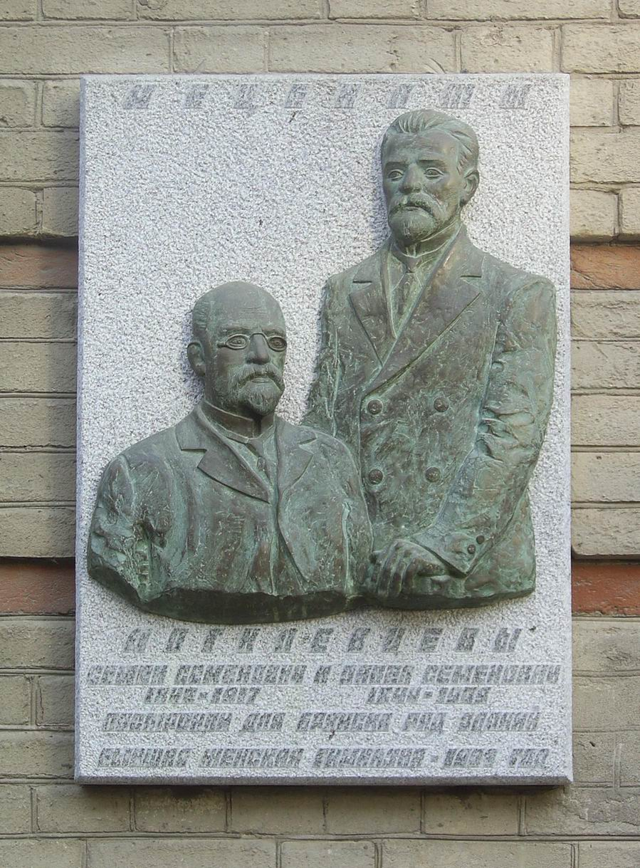 Брянск, мемориальная доска П.С. и С.С. Могилевцевым на здании женской гимназии